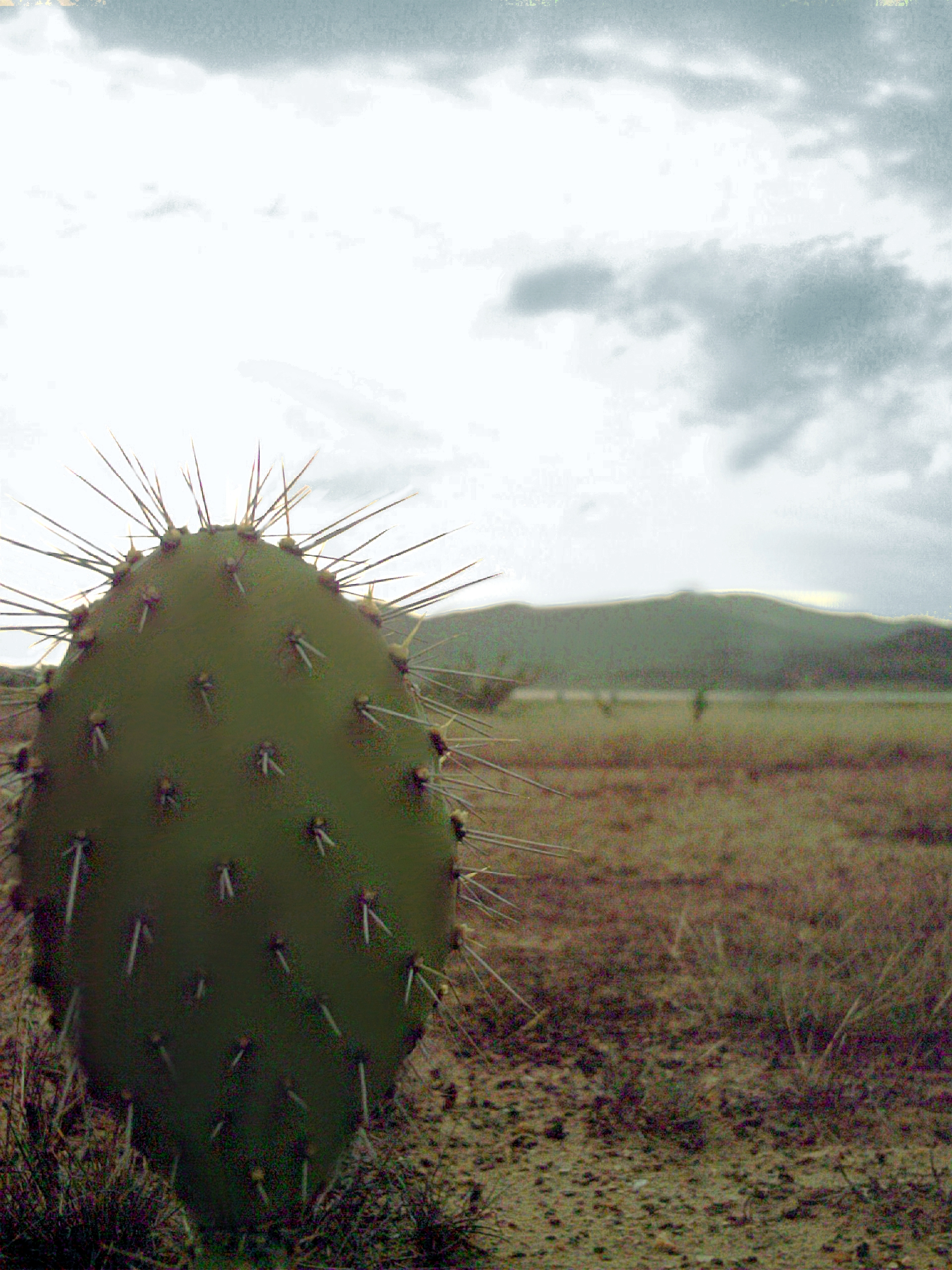 Así luce un ambiente xerófilo.